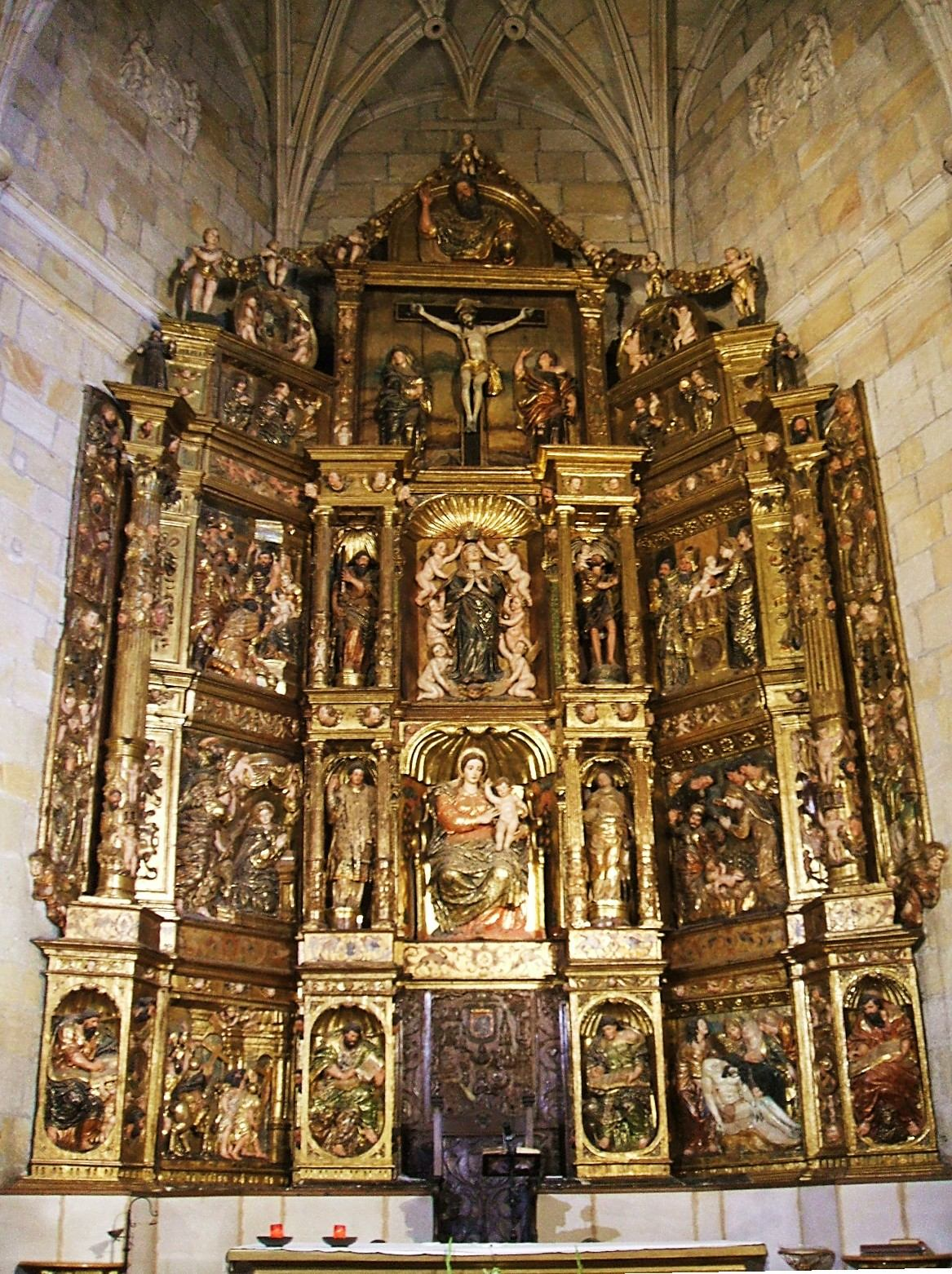 Retablo mayor renacentista de la Iglesia de Santa María la Mayor, Soria, Castilla y León, España